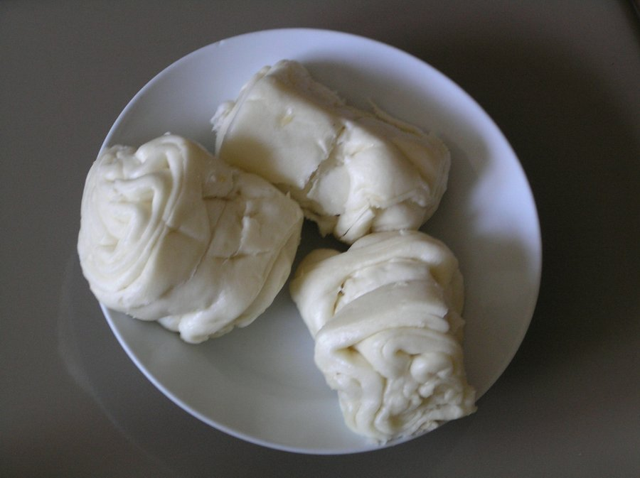 Mandarin roll